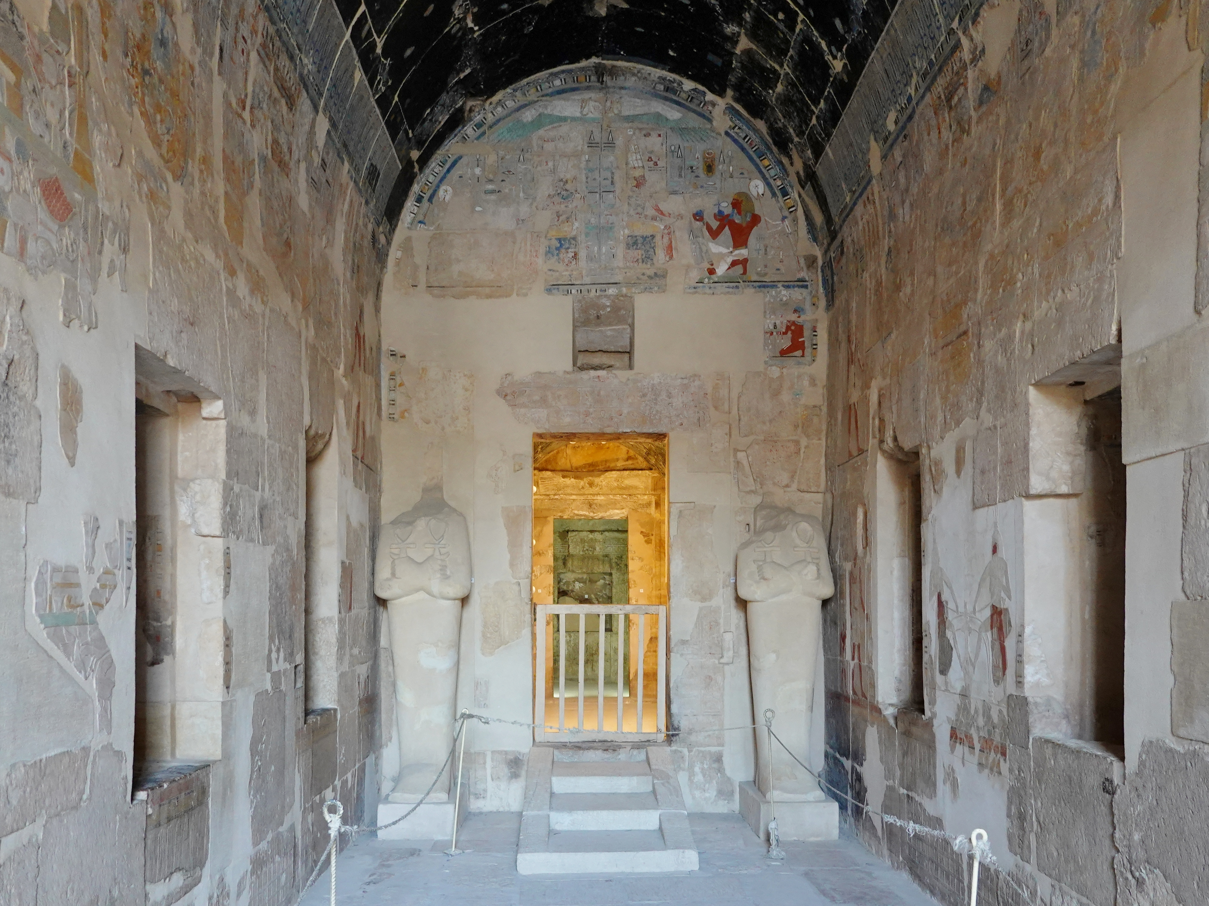 Barkenhalle im Heiligtum des Amun-Re im Totentempel der Hatschepsut in Deir el-Bahari nordwestlich von Luxor, Ägypten